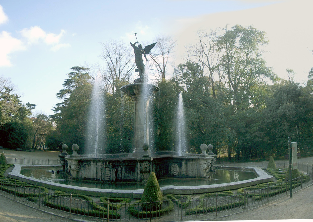 Panorámica vertical de la Fuente de La Fama en Valladolid, Campo Grande